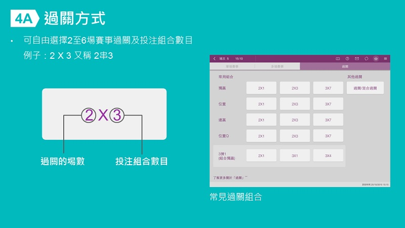 過關方式組合